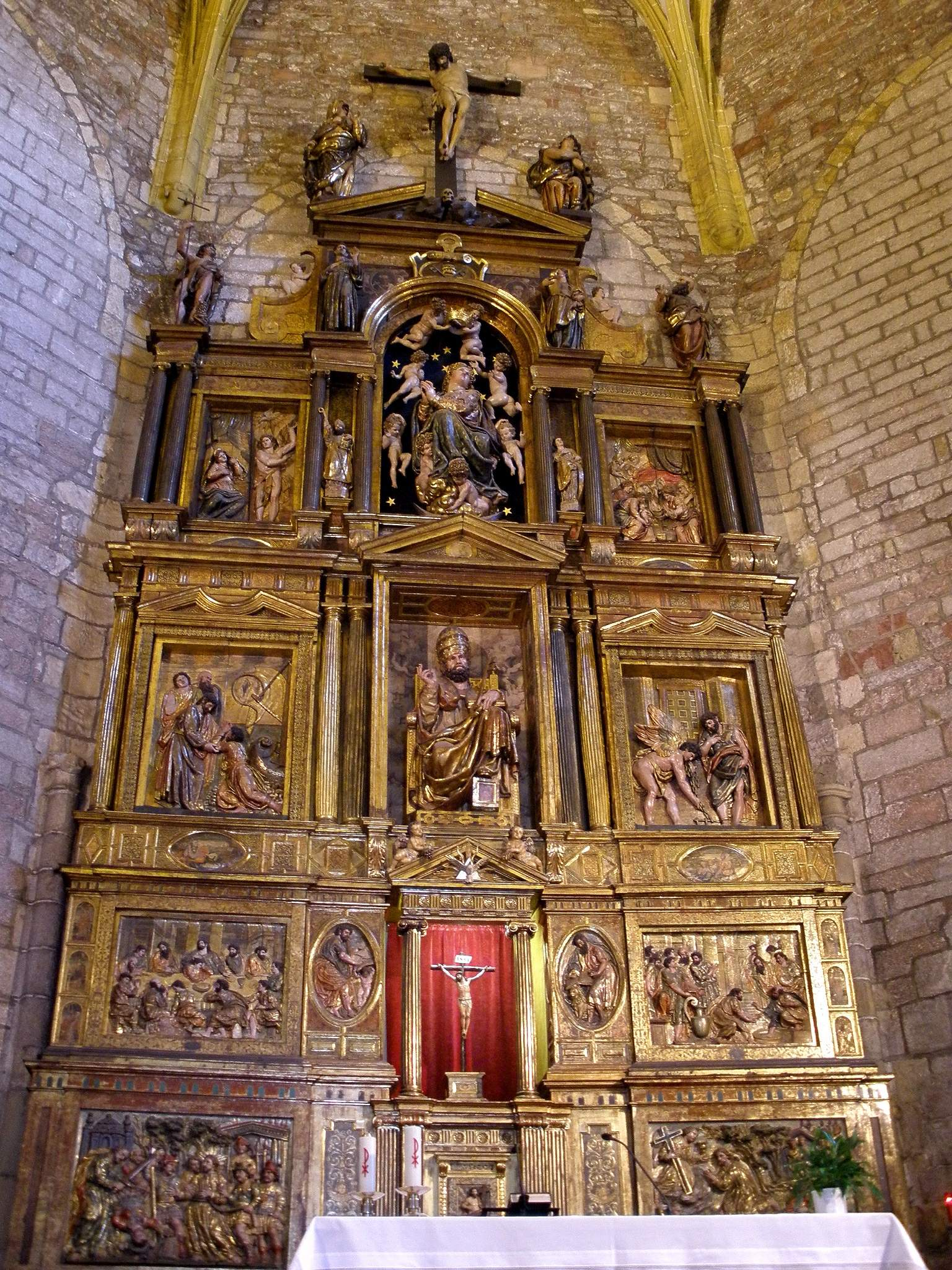 Iglesia de San Pedro, Zumaia (Gipuzkoa). Retablo mayor renacentista, estilo manierista romanista. Obra de Juan de Anchieta, finales del siglo XVI